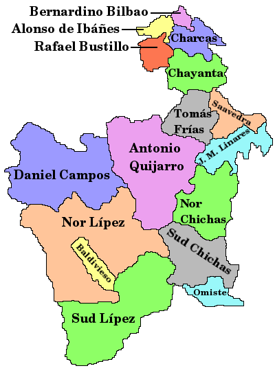 Carte du département de Potosí en Bolivie